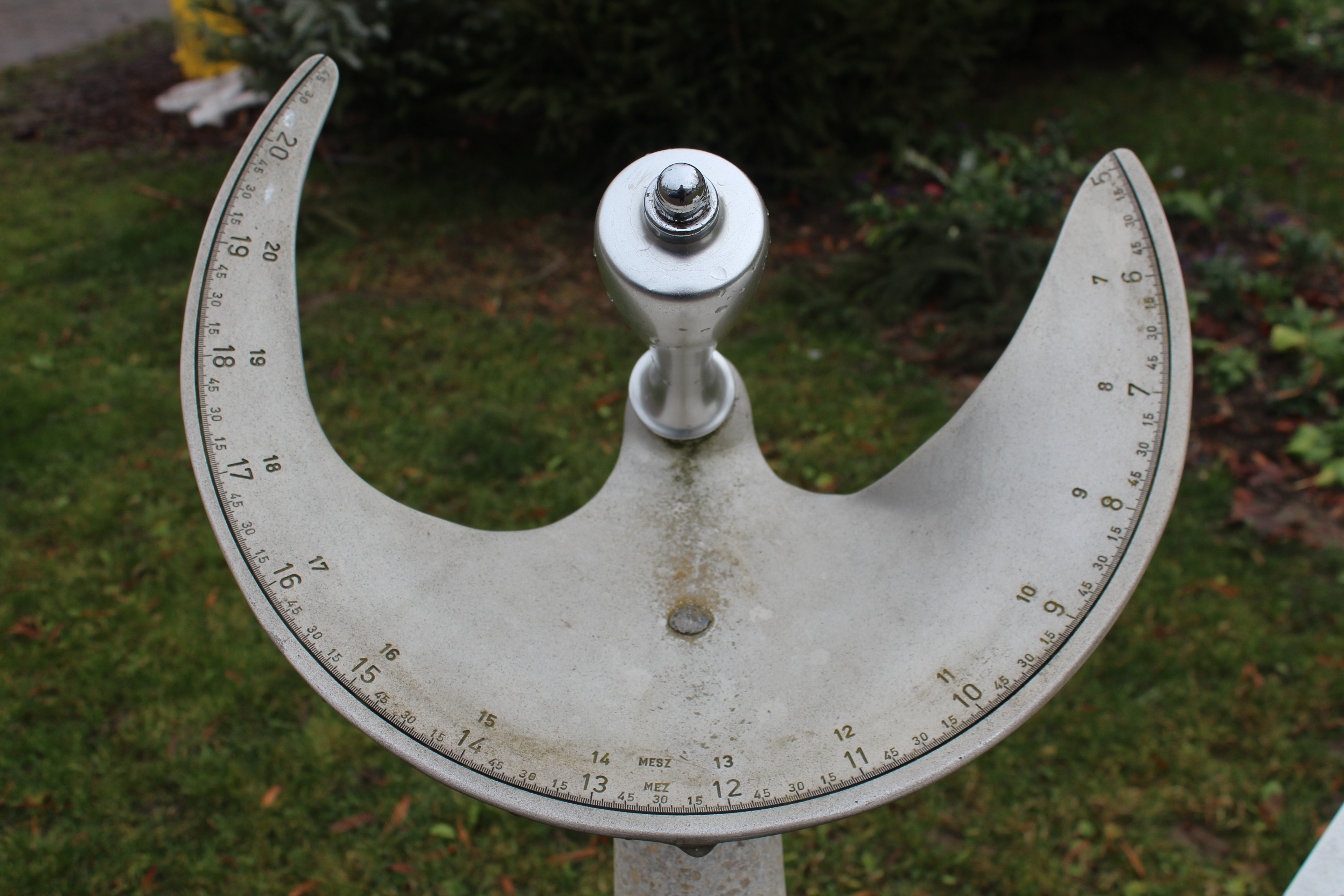 Cadran solaire de précision, place de la République, Châtillon-sur-Chalaronne.